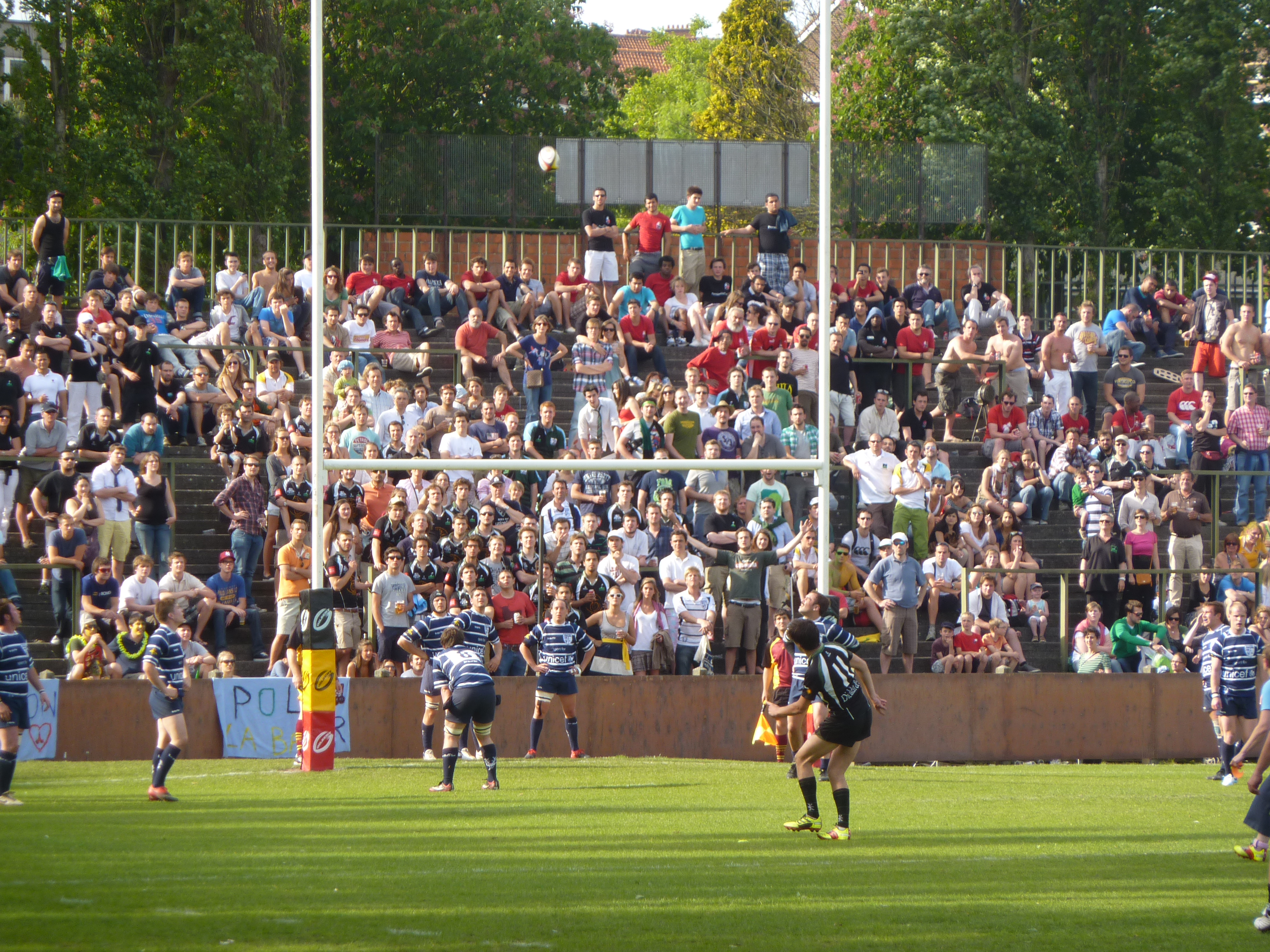 Finale du championnat de Belgique de rugby à XV 2010-2011 entre Kituro RC et Boitsfort RC.